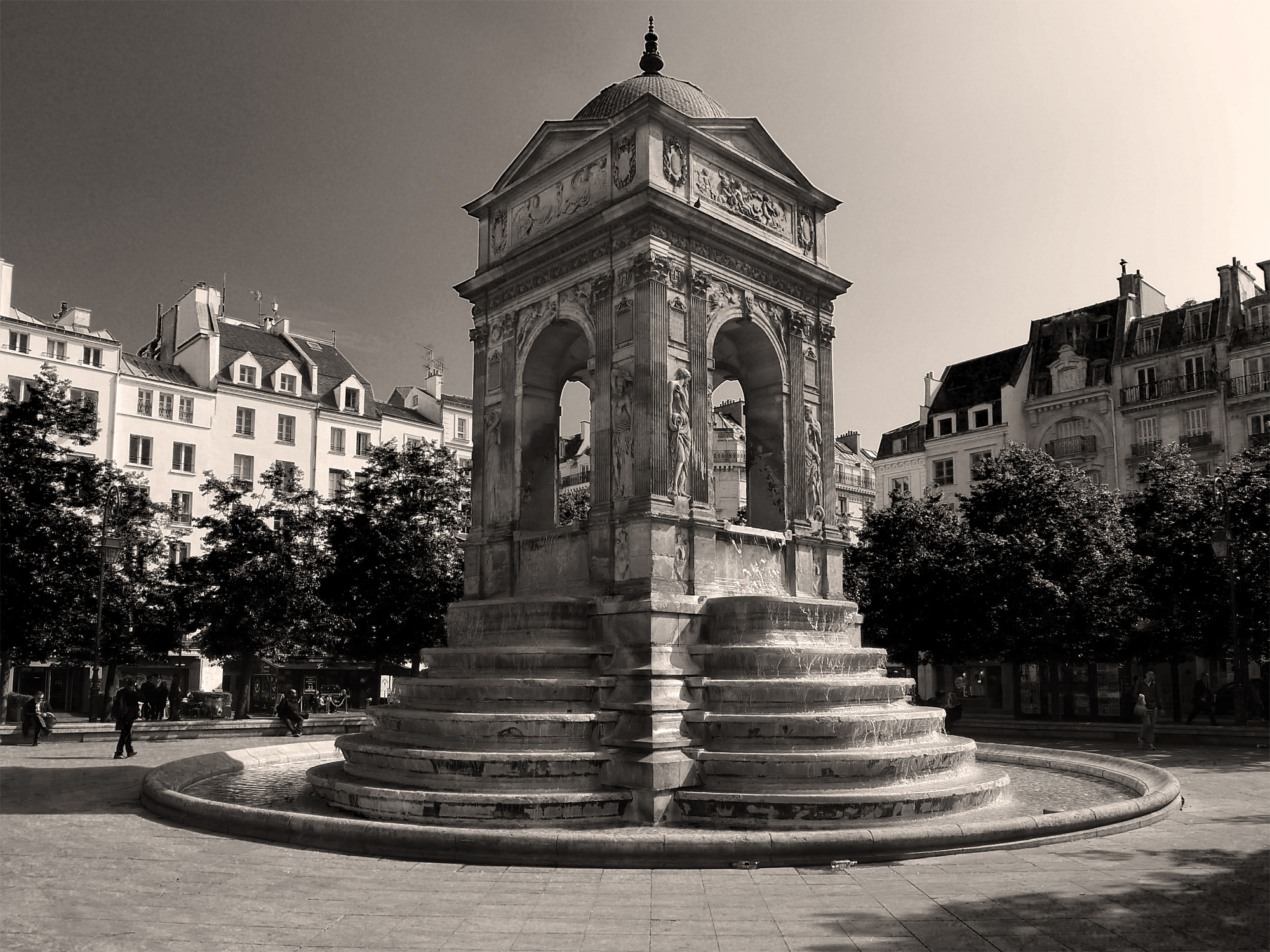 Place Joachim du Bellay avec la fontaine des Innocents en son centre - Paris Ier